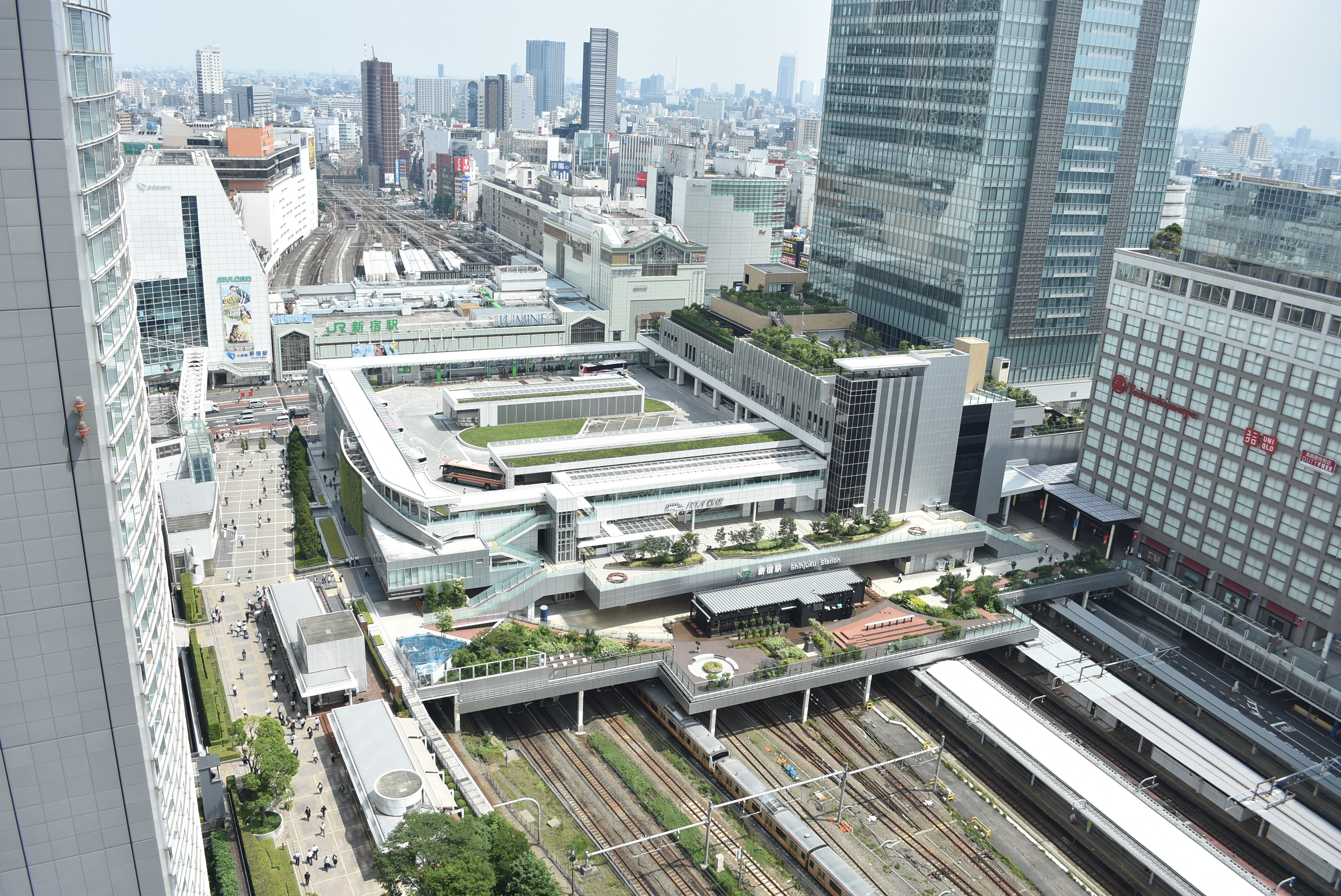 新宿駅全景